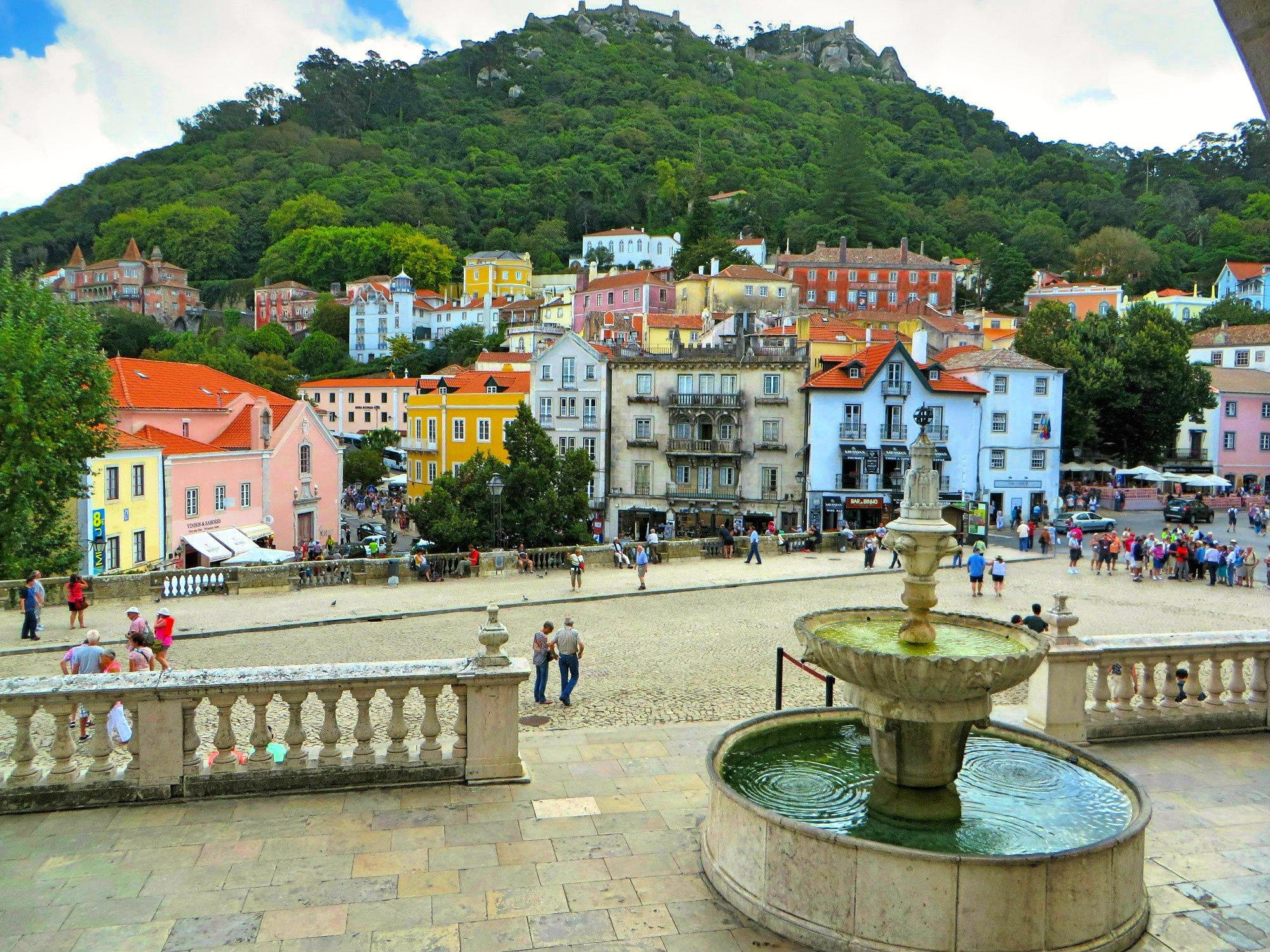 Vista de Sintra